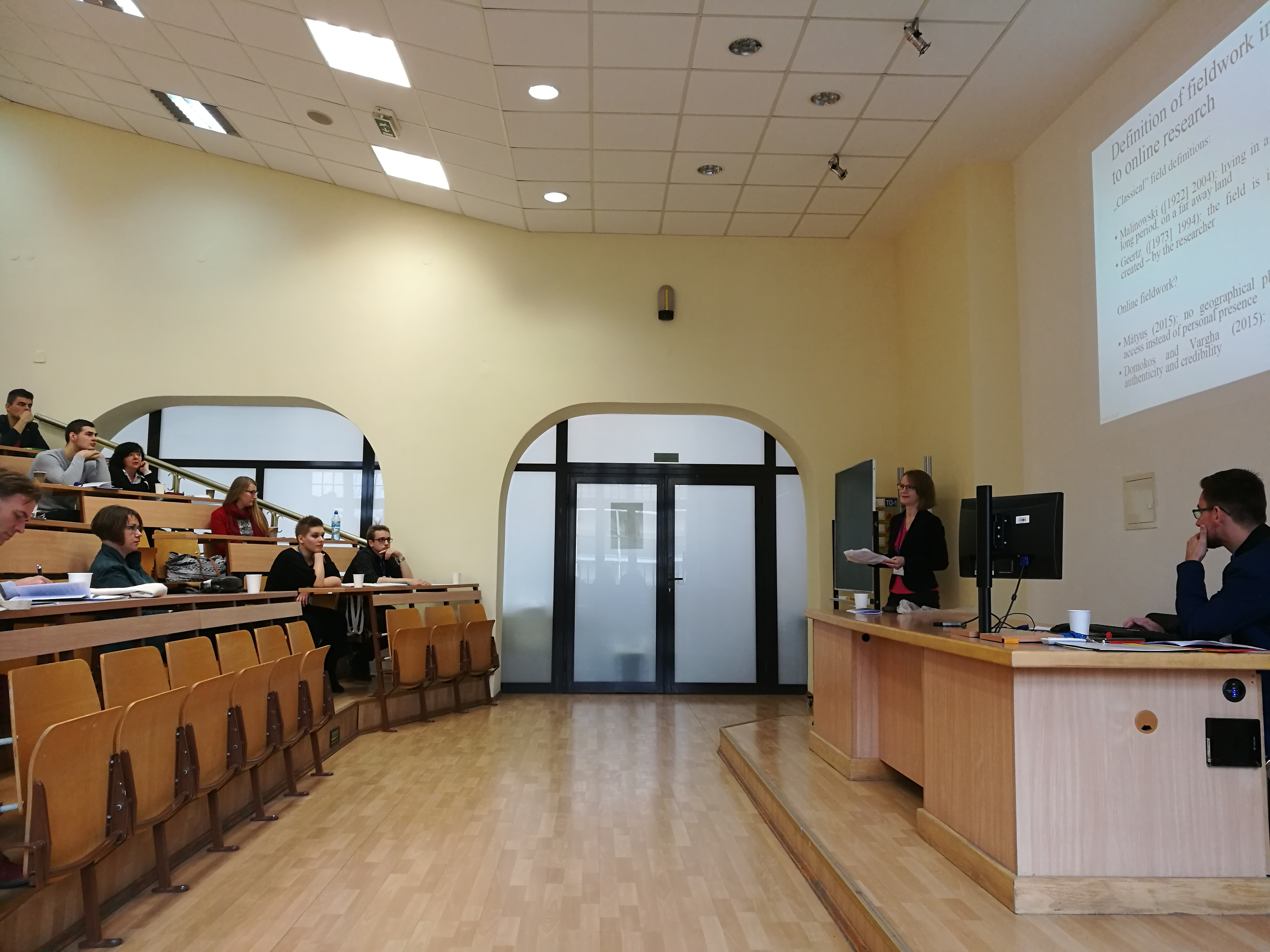 Wystąpienie podczas międzynarodowej konferencji Ethnology Without Borders 2018, organizowanej przez Katedrę Etnologii i Antropologii Kulturowej Uniwersytetu Wrocławskiego.